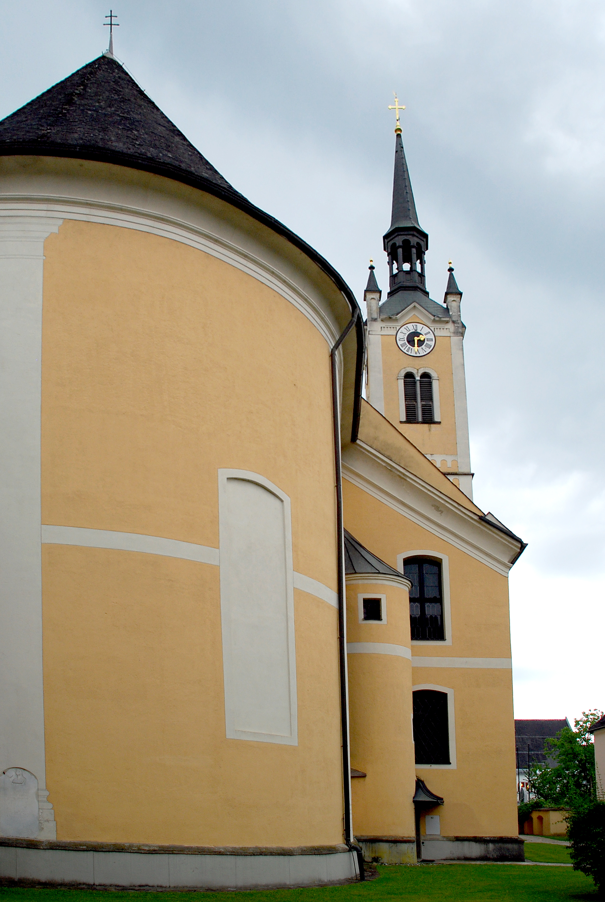 Deutschlandsberg, Steiermark, Österreich: Pfarrkirche Nordseite und Westseite, Apsis Turm